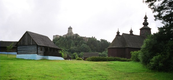 Skansen i zamek w Starej Lubowli. Zdjęcie wykonane w sierpniu 2004